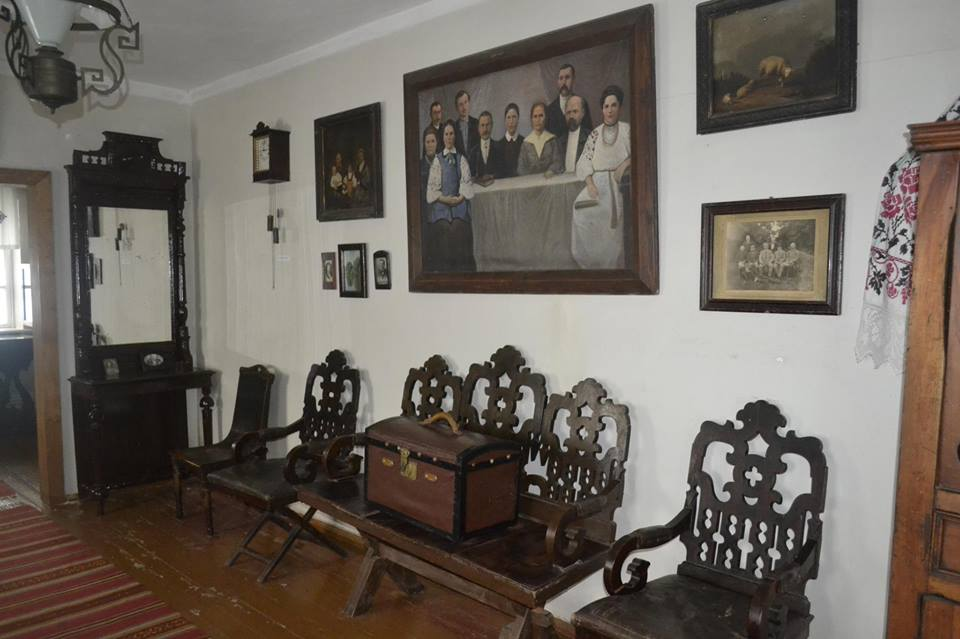 музей